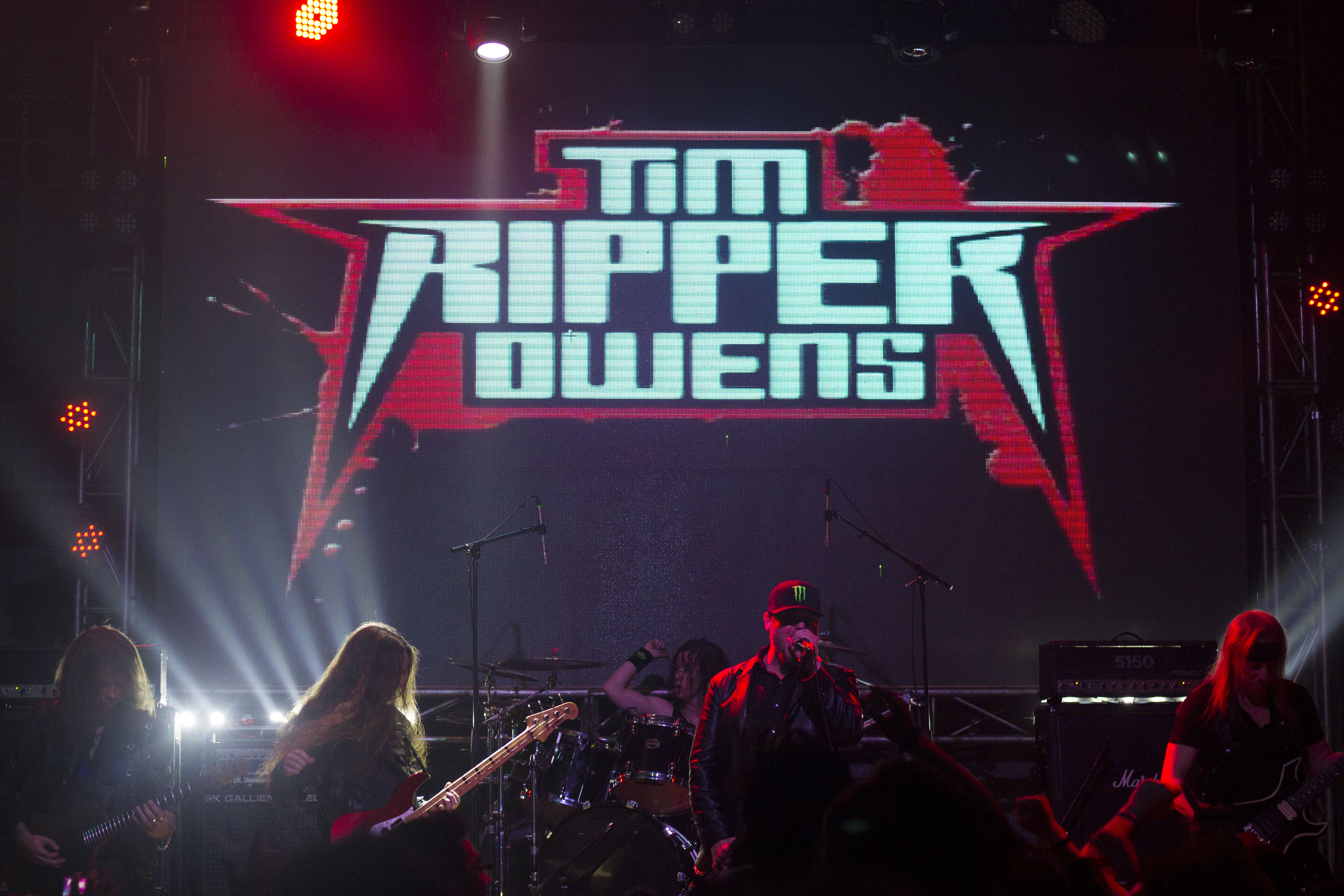 Tim Ripper Owens en vivo.